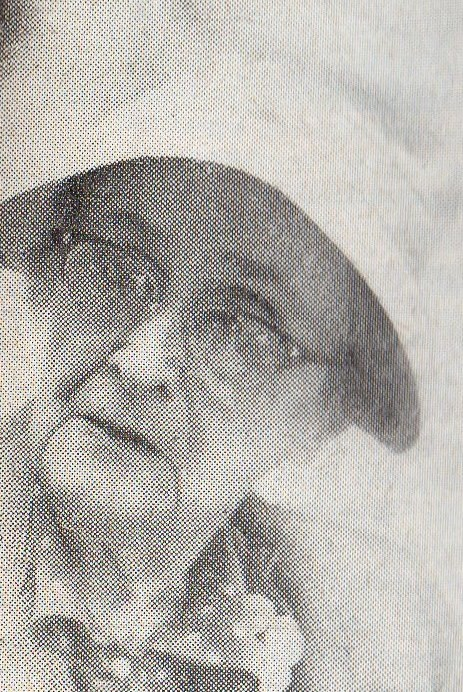 Kazimiera Iłłakowiczówna około 1982r.